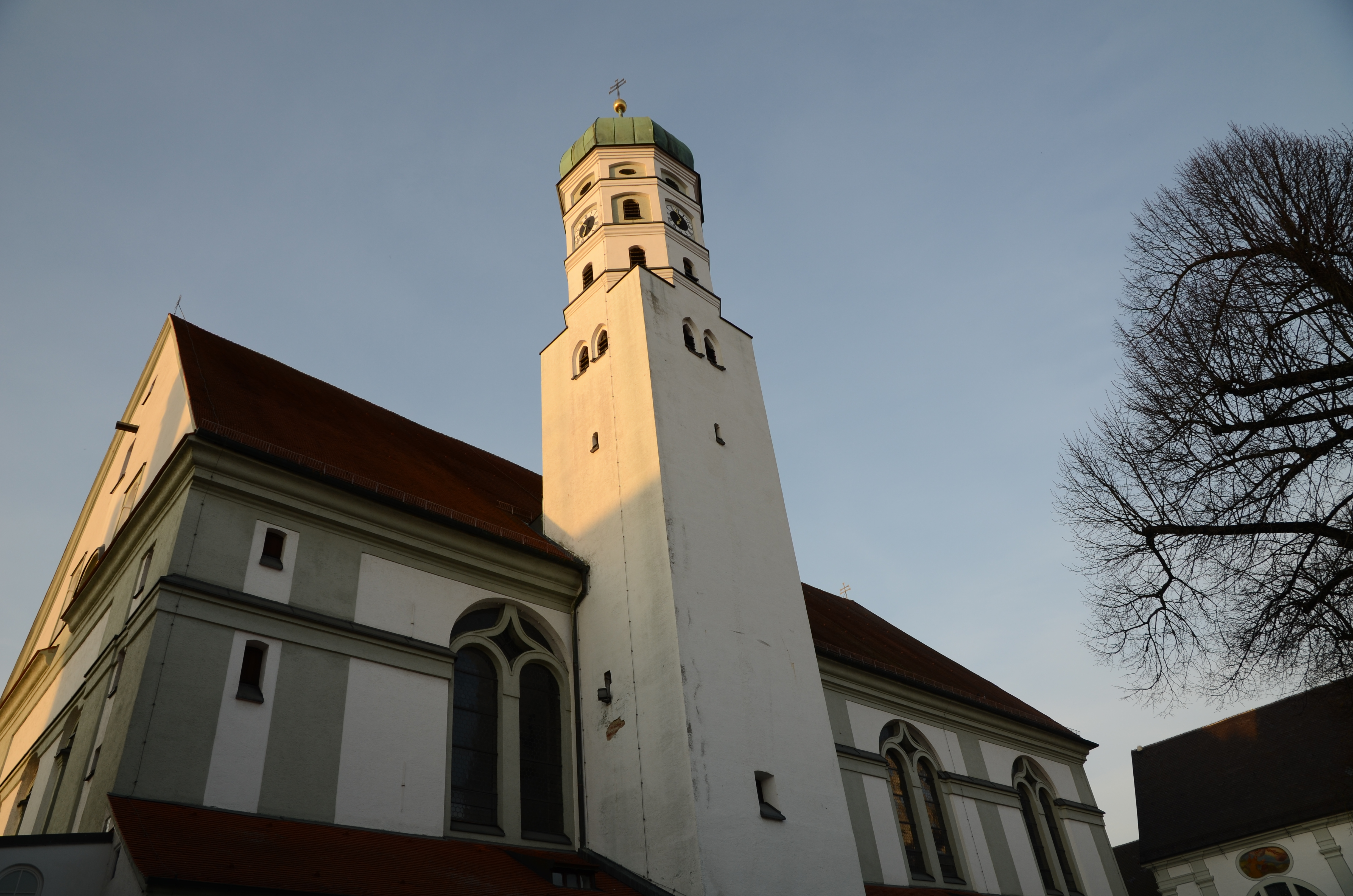 St Peter, Dillingen an der Donau